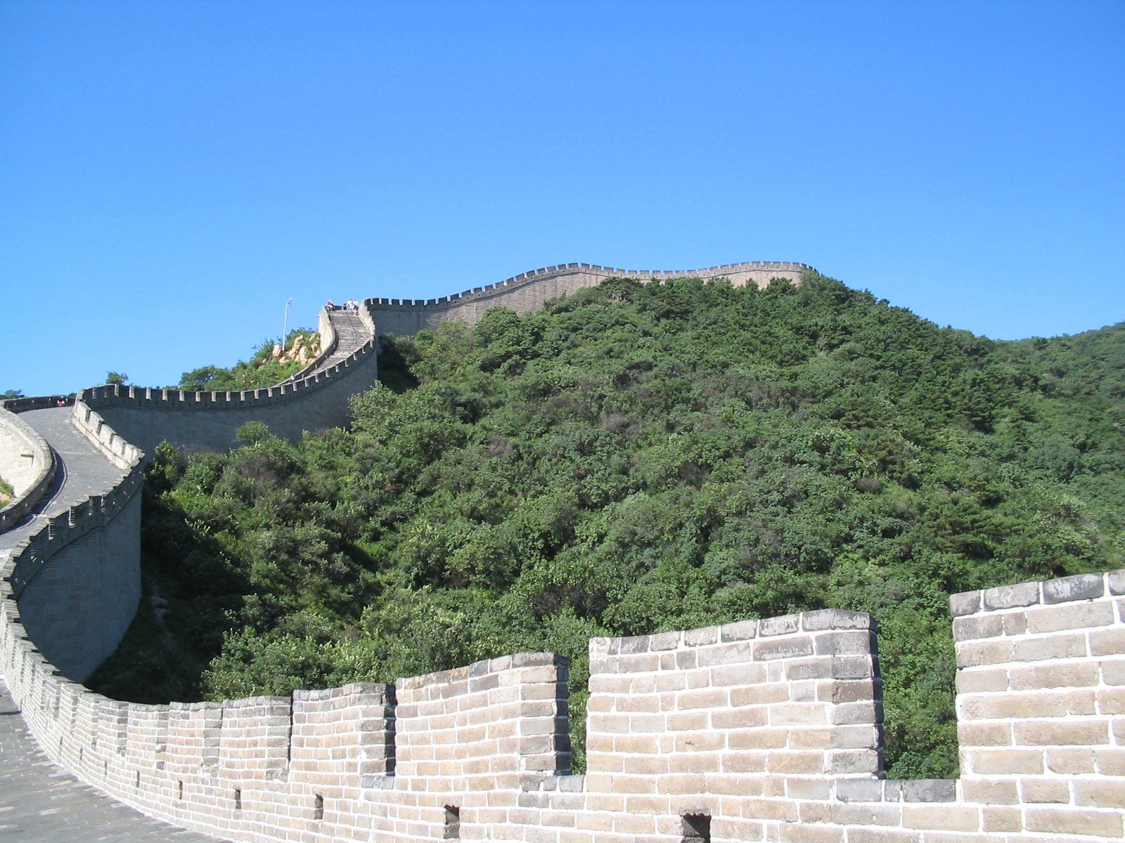 我自己于2005年7月27日在八达岭长城拍摄。